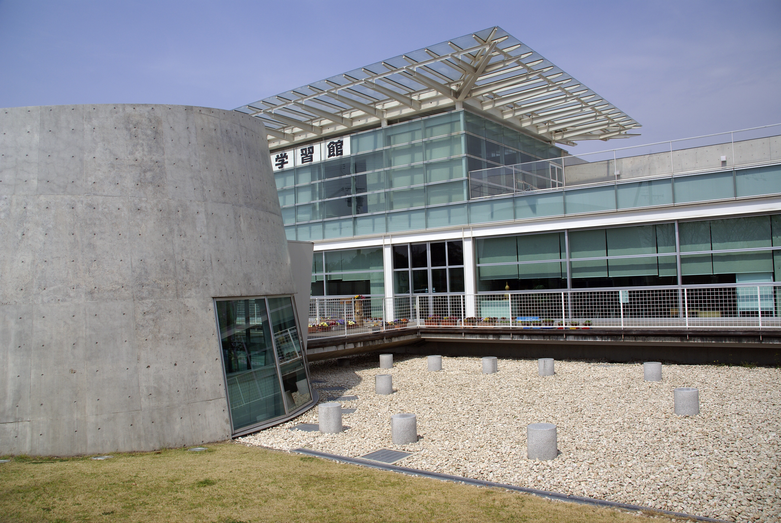 Ikegami-sone ruins in Izumi, Osaka prefecture, Japan